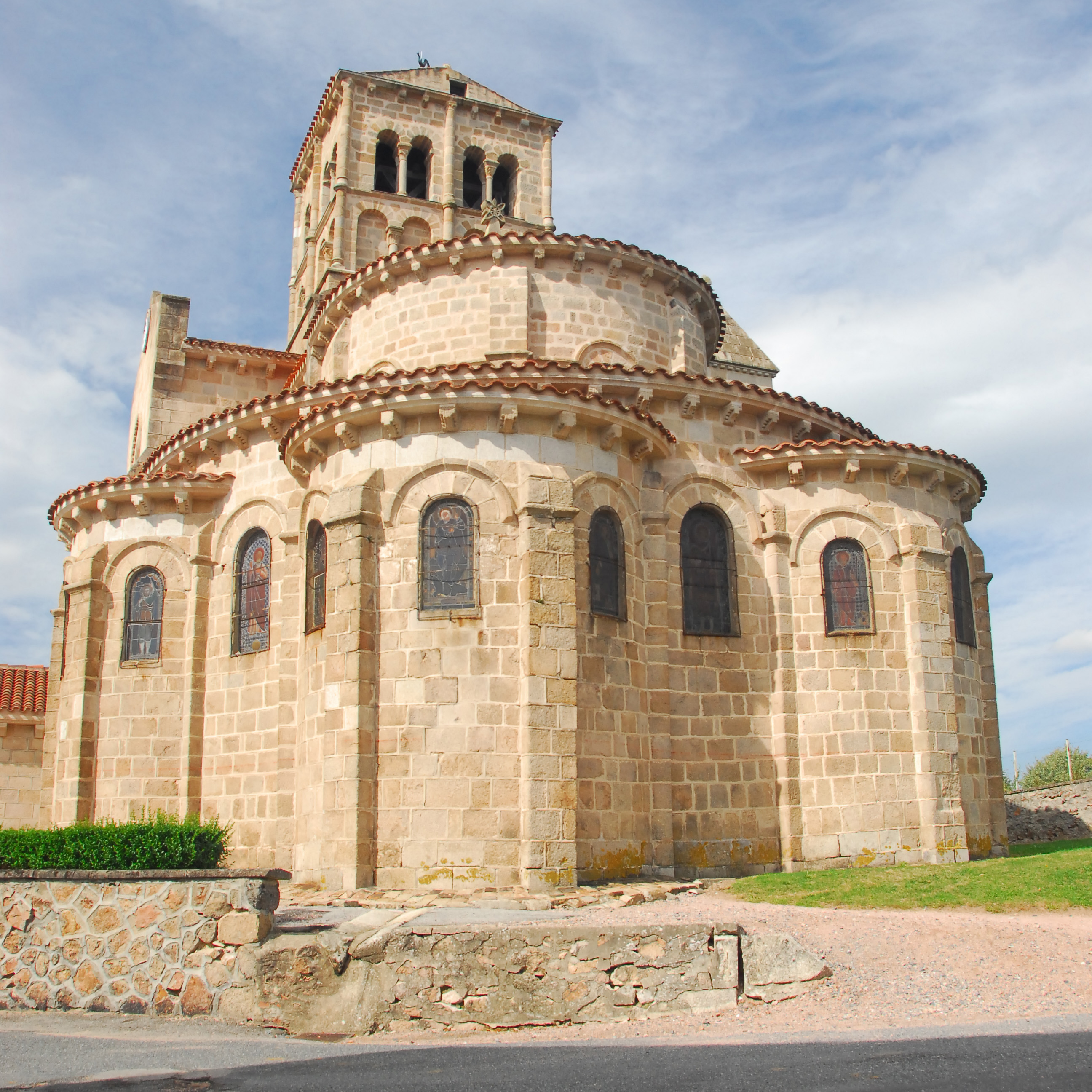 N.-D. de Châtel-Montagne, Chorhaupt von SO